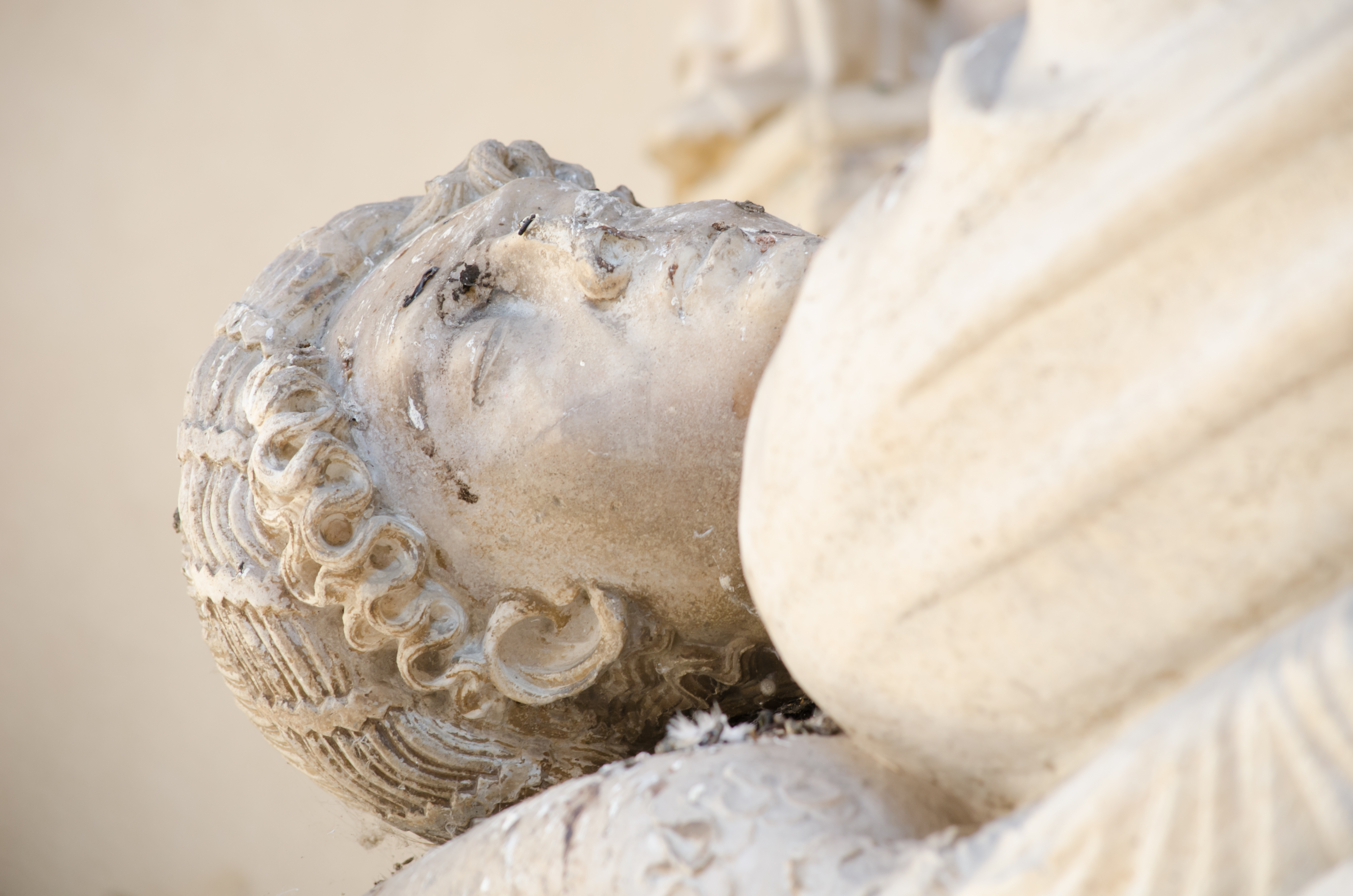 Particolare della tomba di Paola Bianca nella chiesa di San Francesco di Fano. This is a photo of a monument which is part of cultural heritage of Italy.